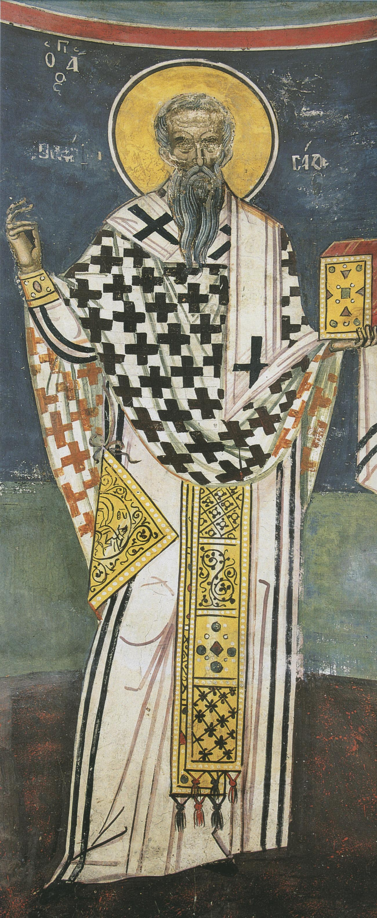 Порфирий Газский, свт.; Греция; XVI в.; мастер: Тзортзи (Зорзис) Фука; местонахождение: Греция. Афон, монастырь Дионисиат